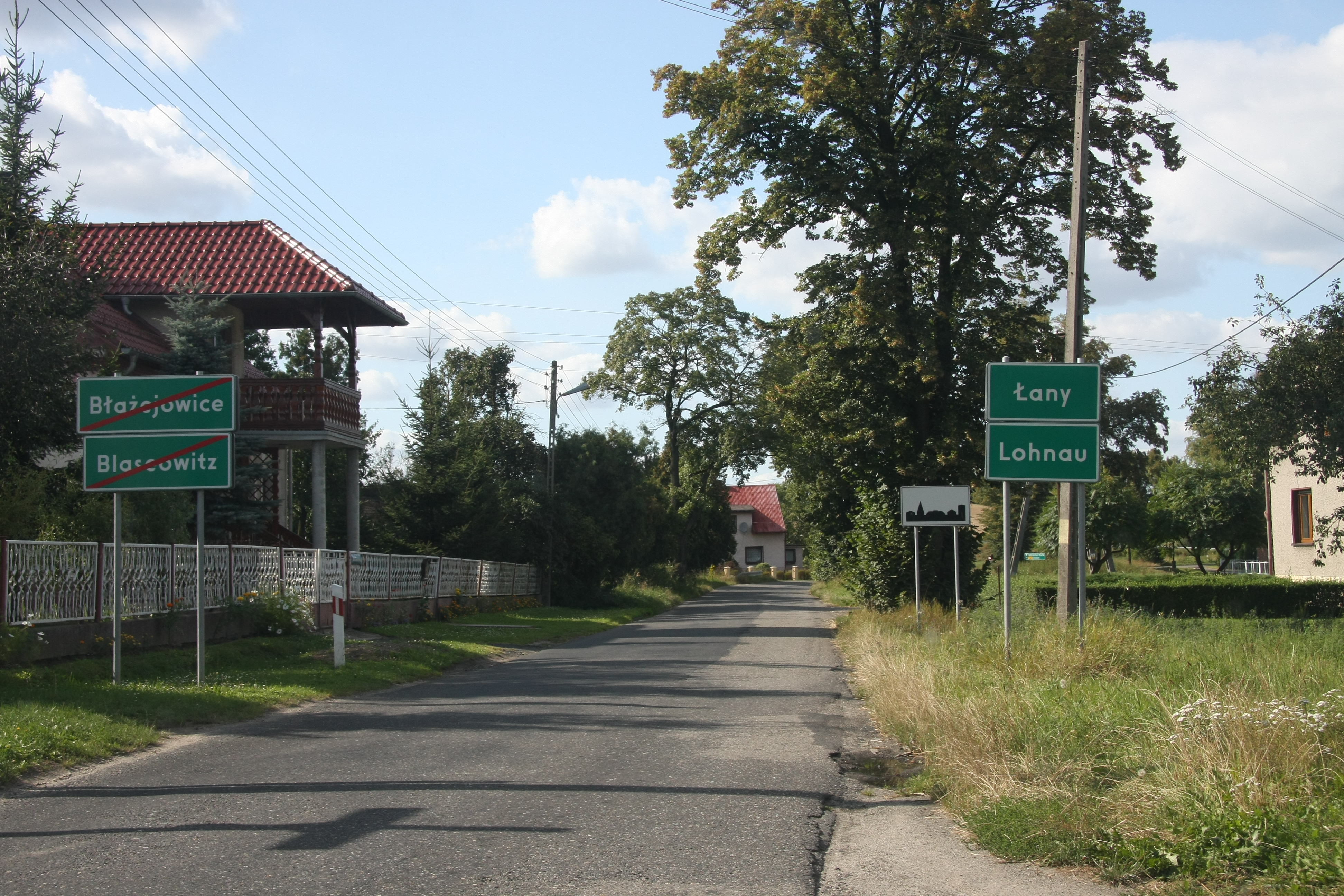 Dwujęzyczne tablice z nazwami: przed wjazdem do Łanów i przy wyjeździe z Błażejowic